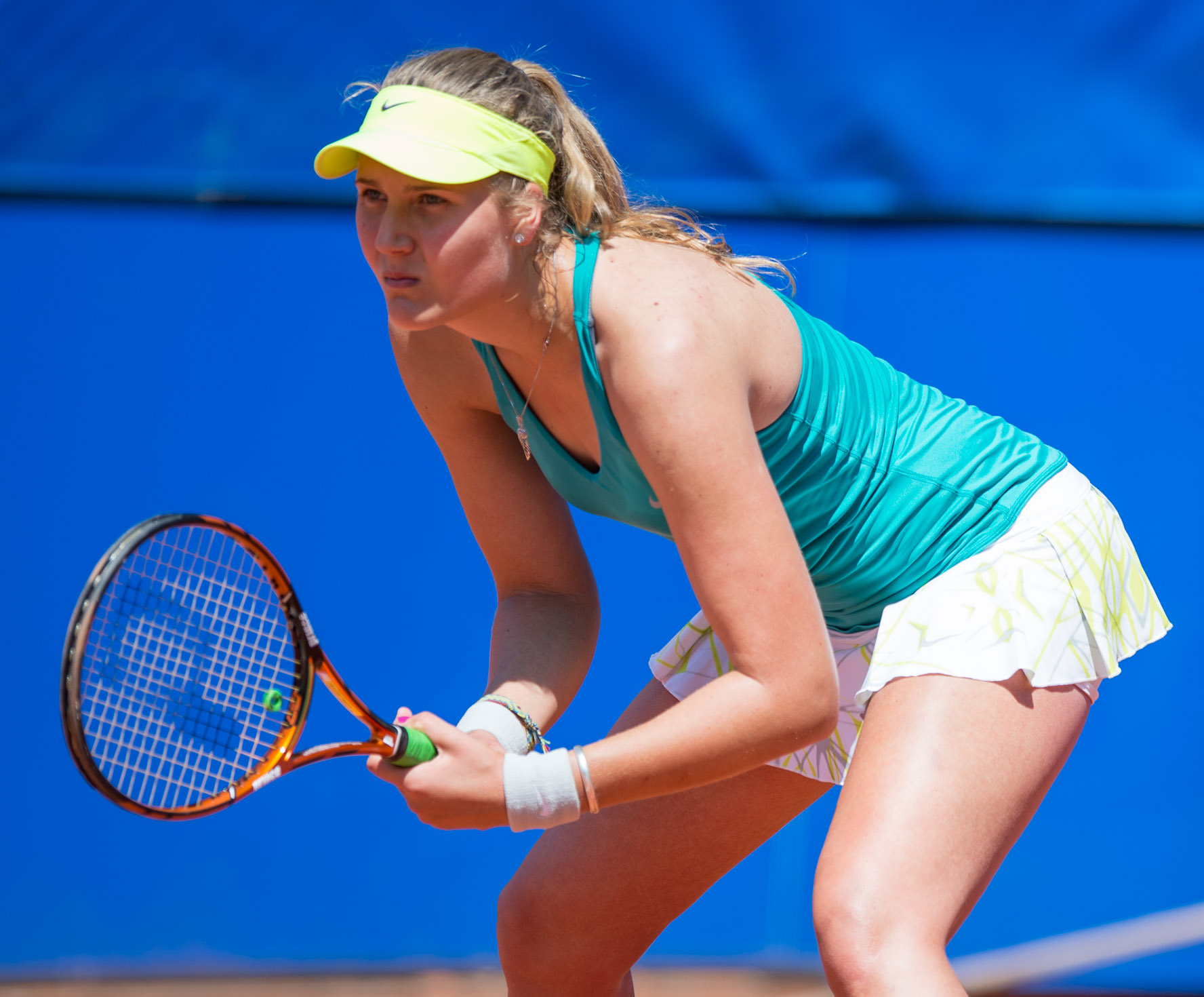 Antonia Lottner,Damentennis,Nürnberger Versicherungscup 2014,Tennis,WTA